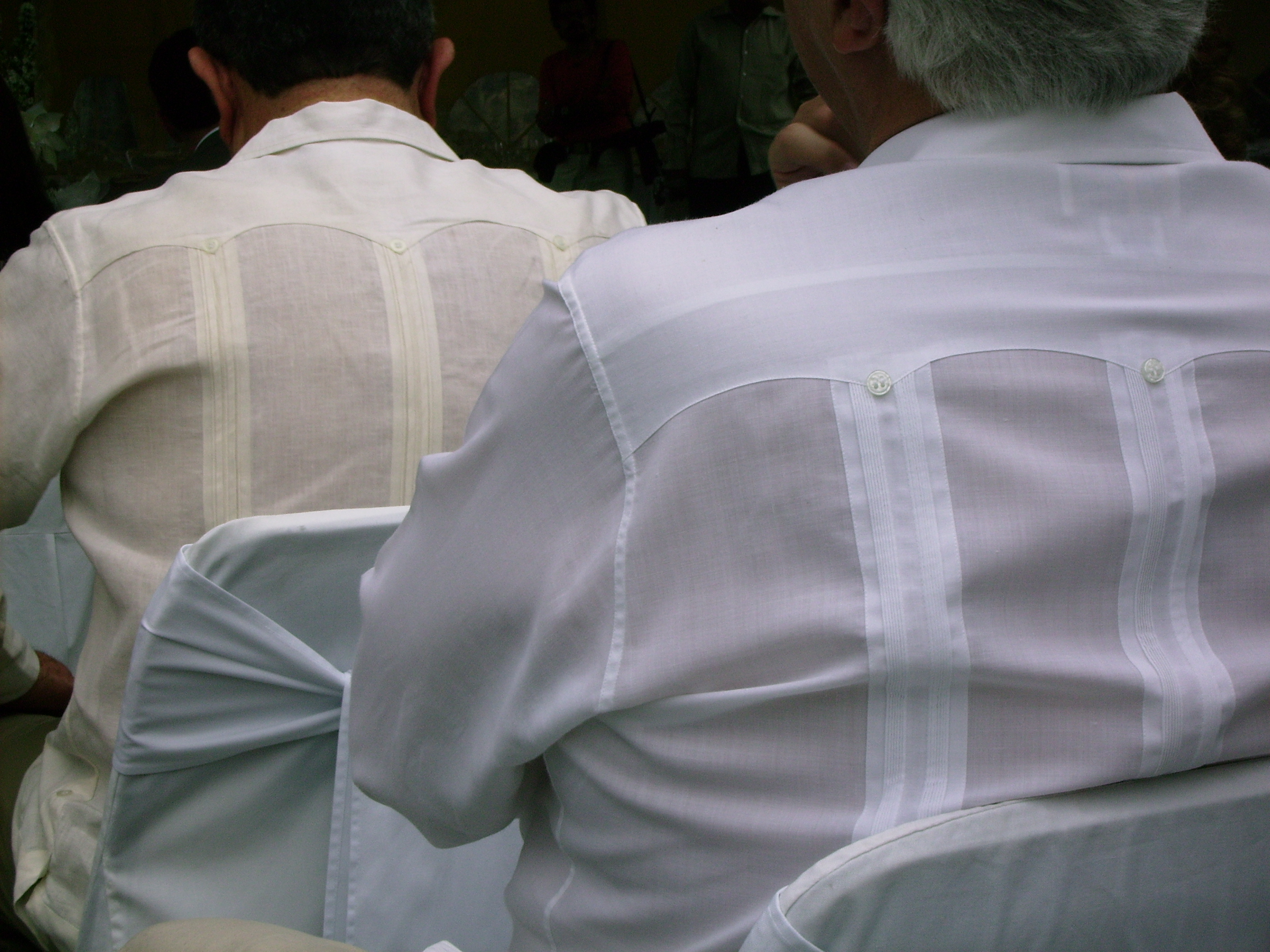 Mexican "Guayaberas", Maurice Marcellin